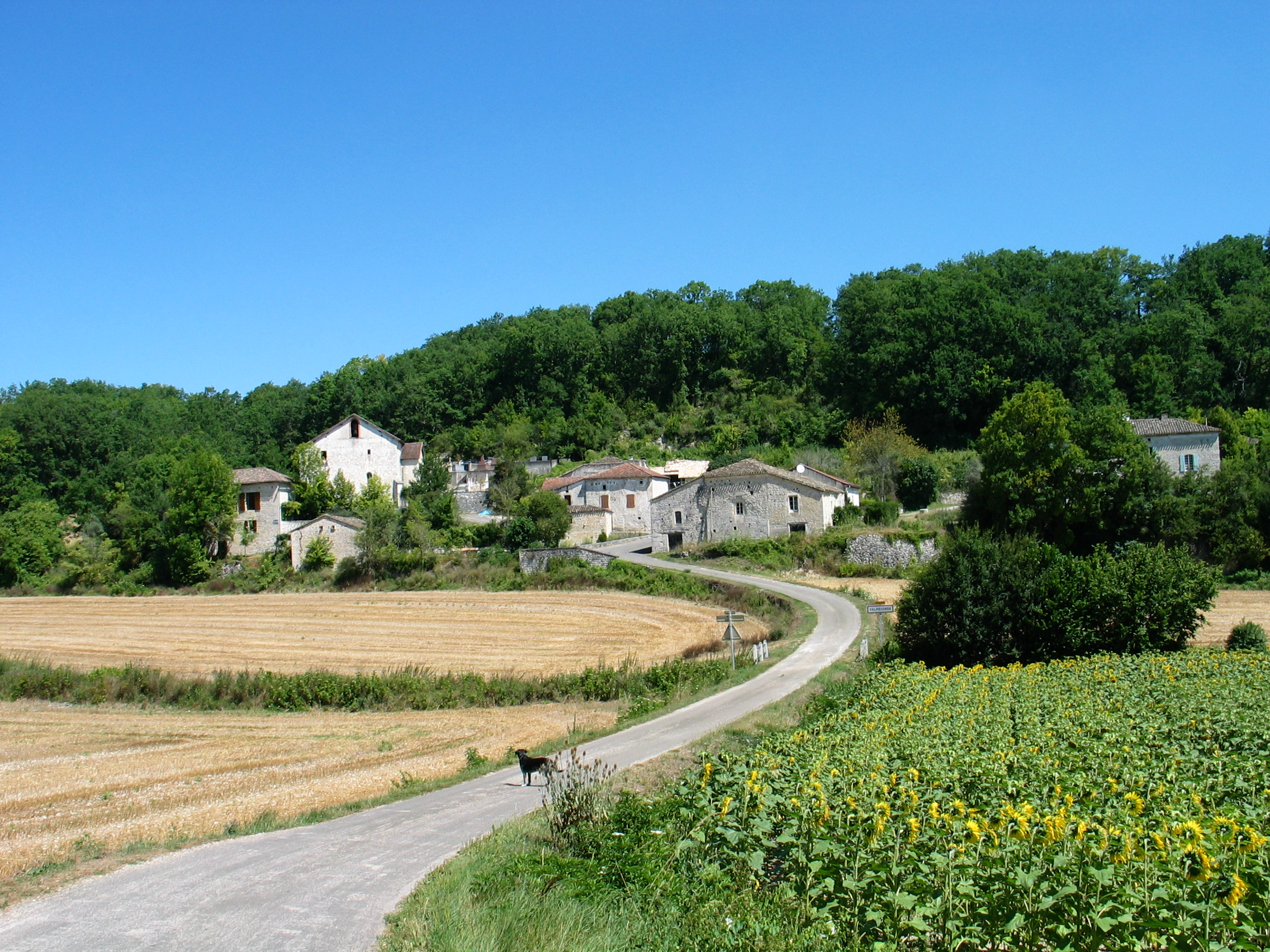 Valprionde (Lot, France) - le village et l'église.